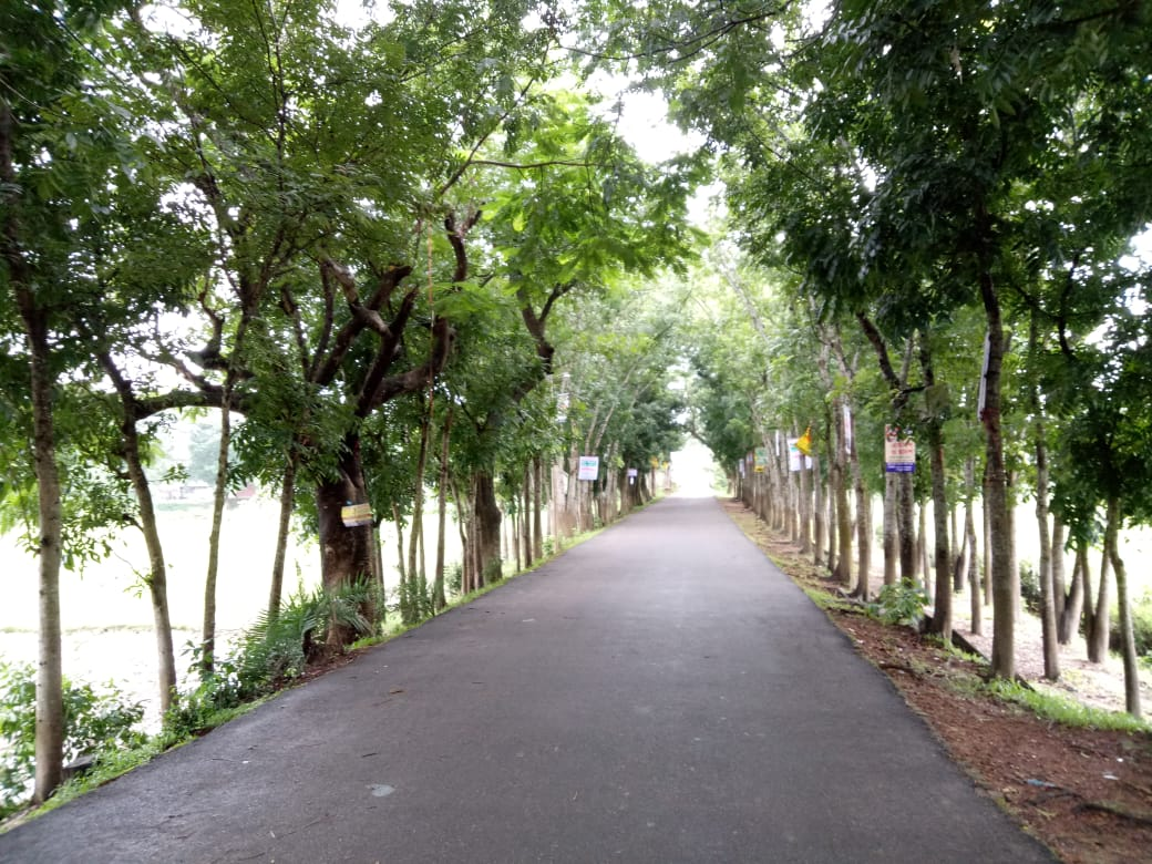 সড়ক